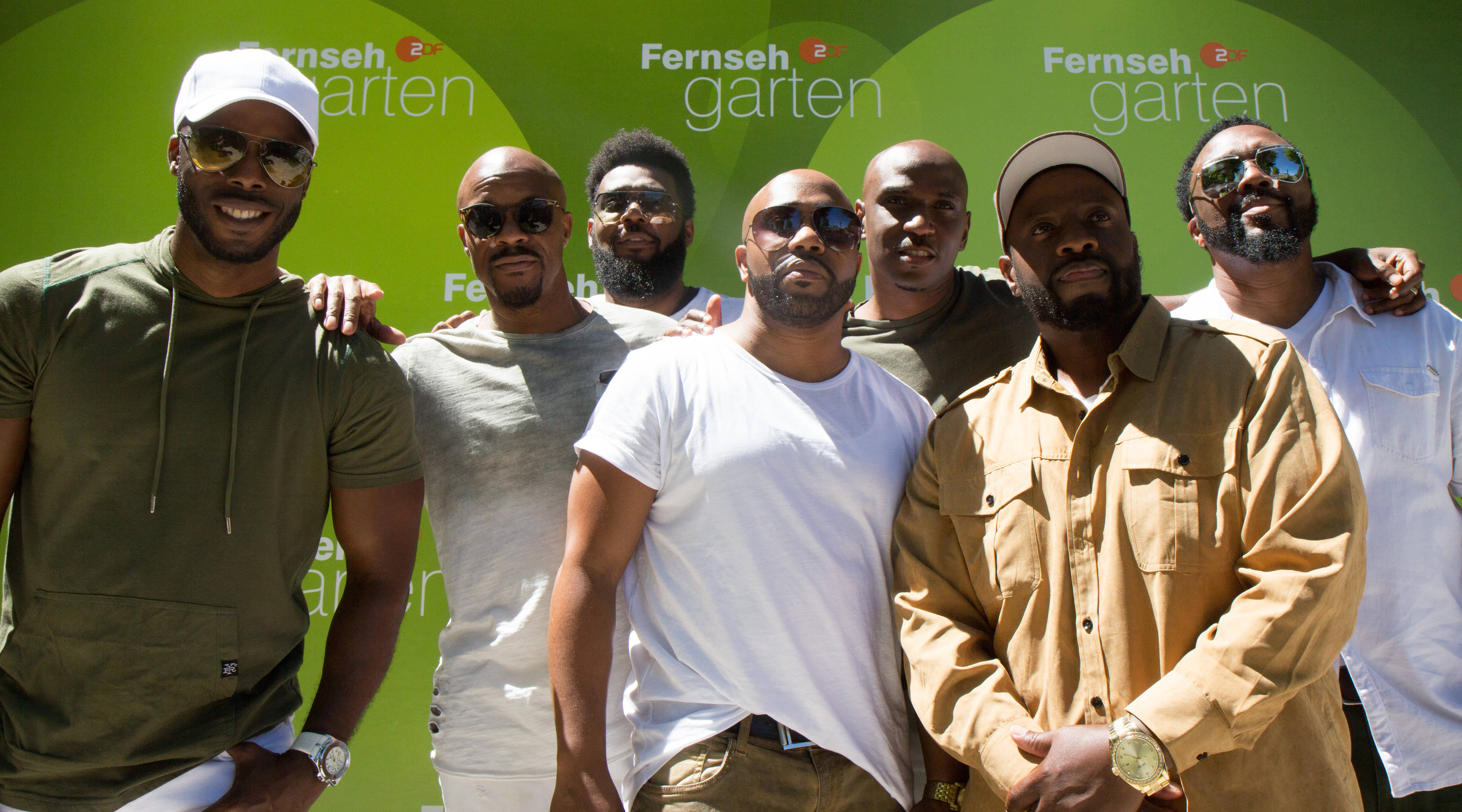 Naturally 7 als Gast beim ZDF-Fernsehgarten am 1. Juli 2018 in Mainz.